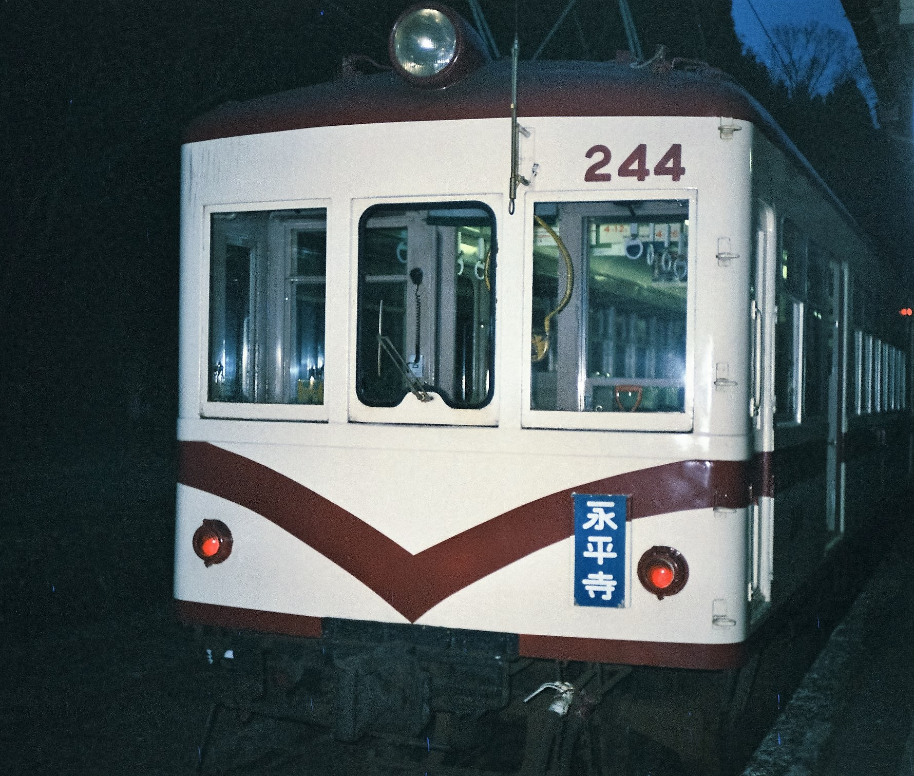 東古市駅（現在の永平寺口駅）に停車中の京福電気鉄道モハ241形244（1987年4月）